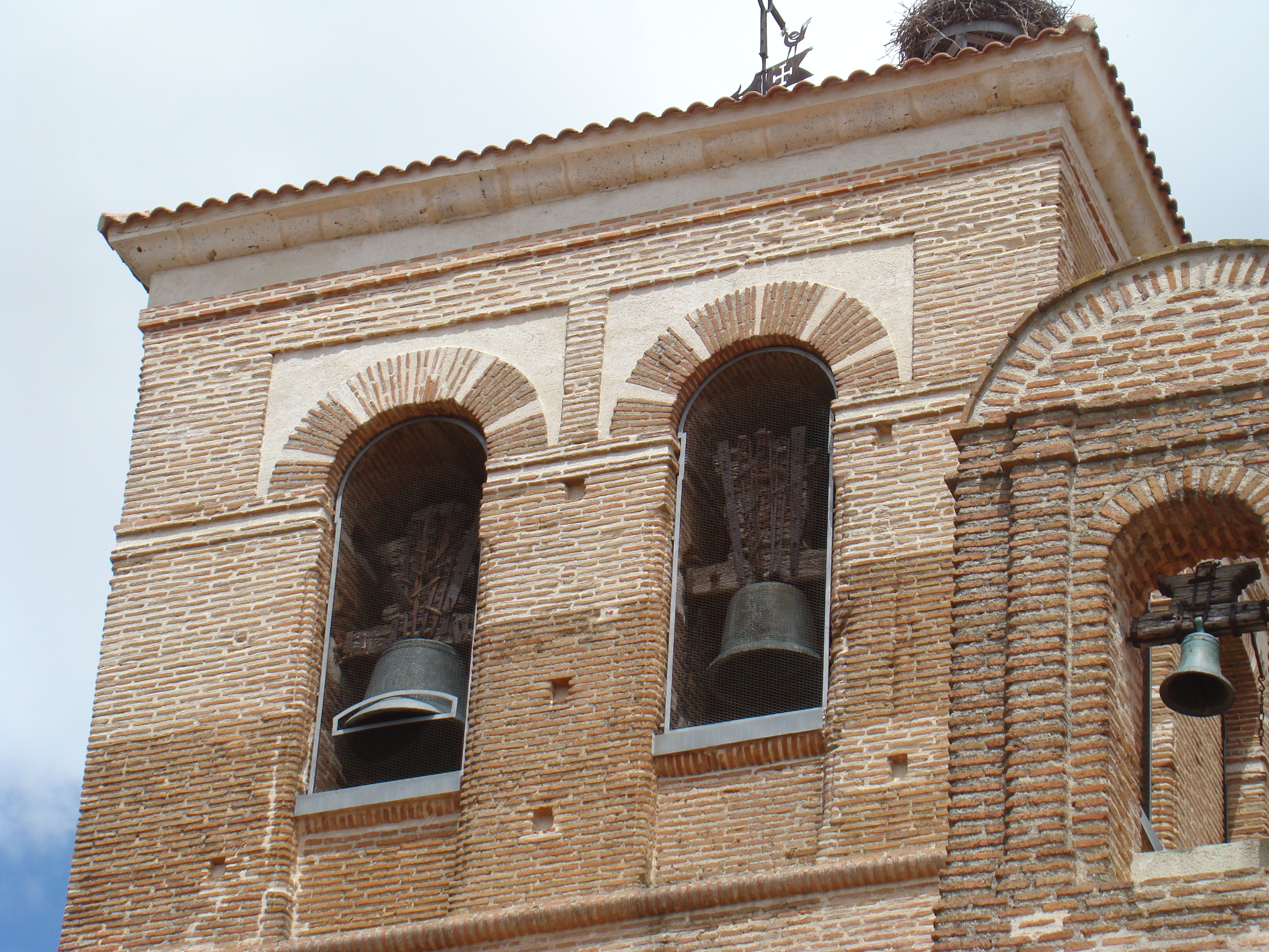 Ventosa de la Cuesta (Valladolid, España) Torre de la iglesia.